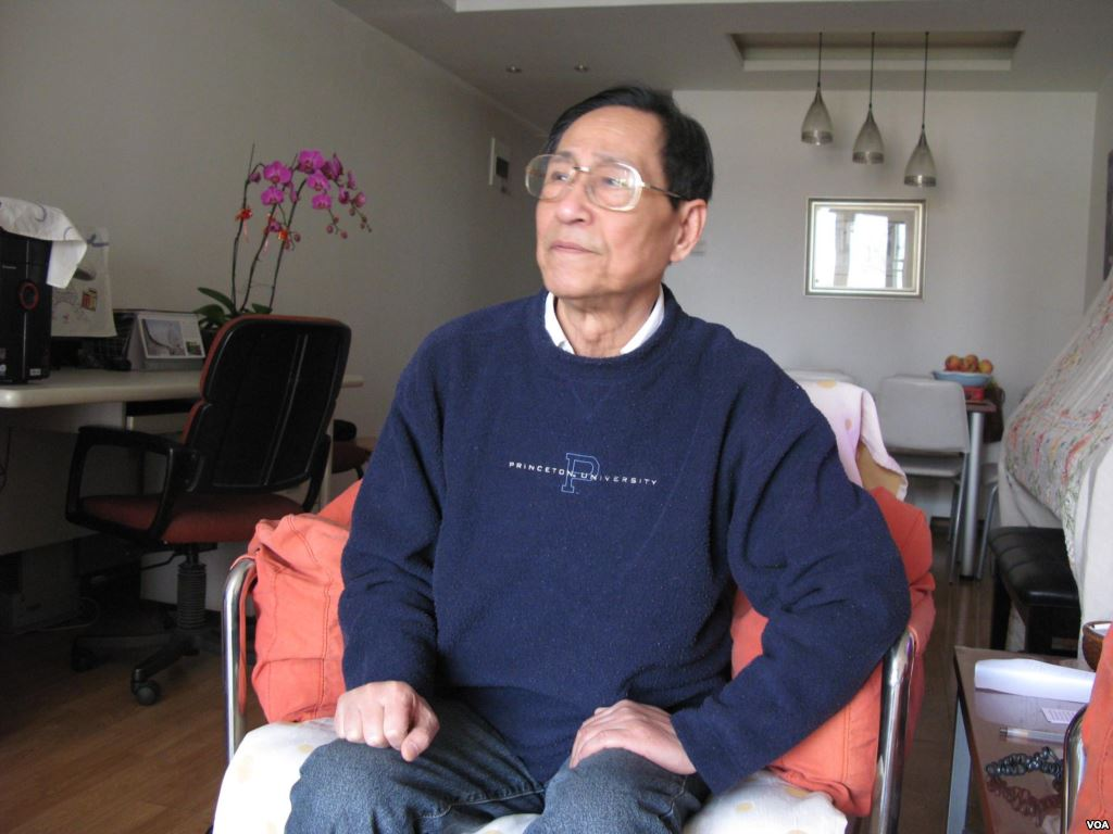 鮑彤資料照。